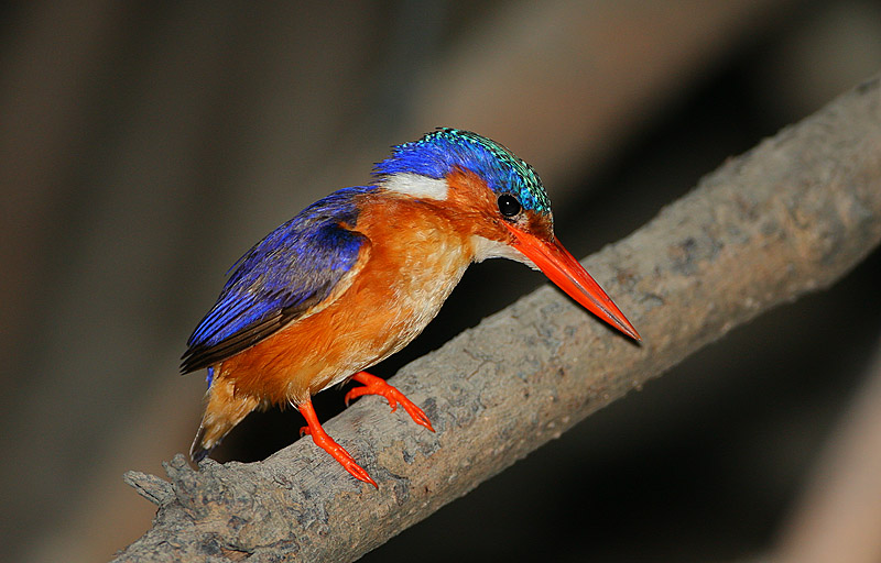 Image taken at Tendaba, The Gambia